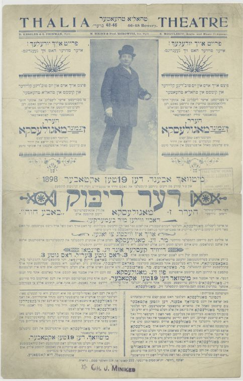 Афиша спектакля «Дэр дибэк» (дибук) с Зигмундом Могулеско (на фотографии), Д. Кесслером и З. Файнманом